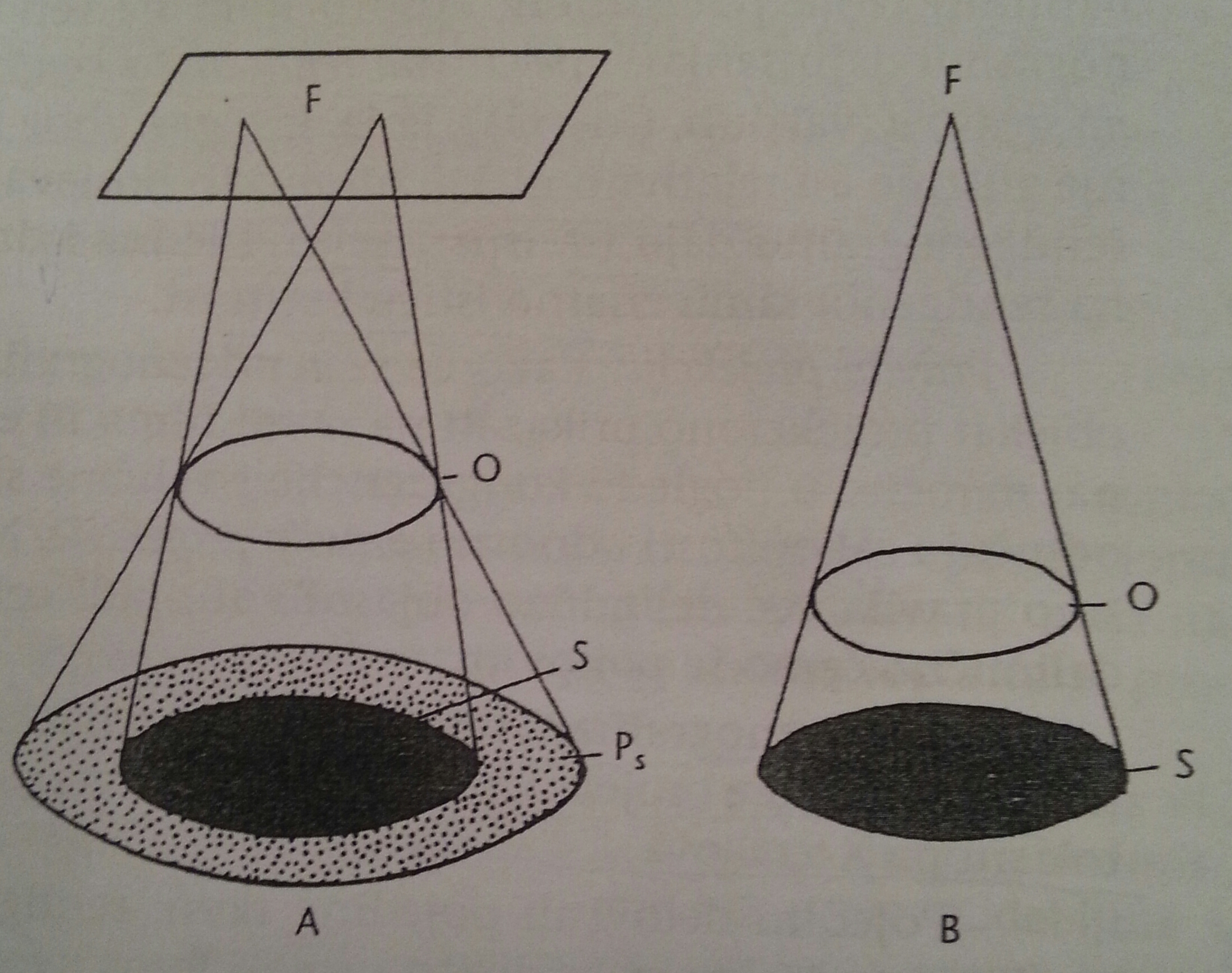 Geometrijski prikaz slike